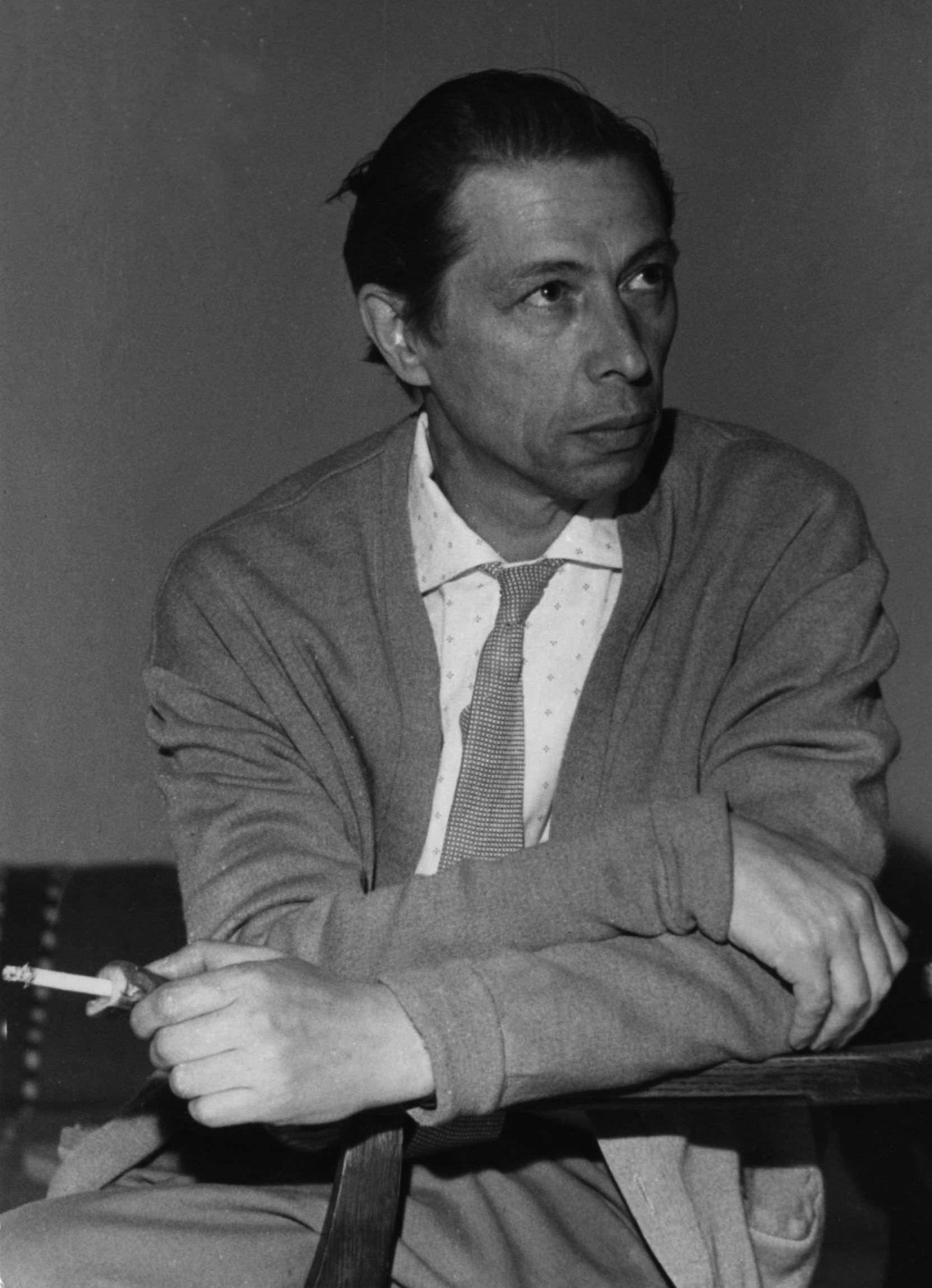 zdjecie malarza Rafala Chwoles